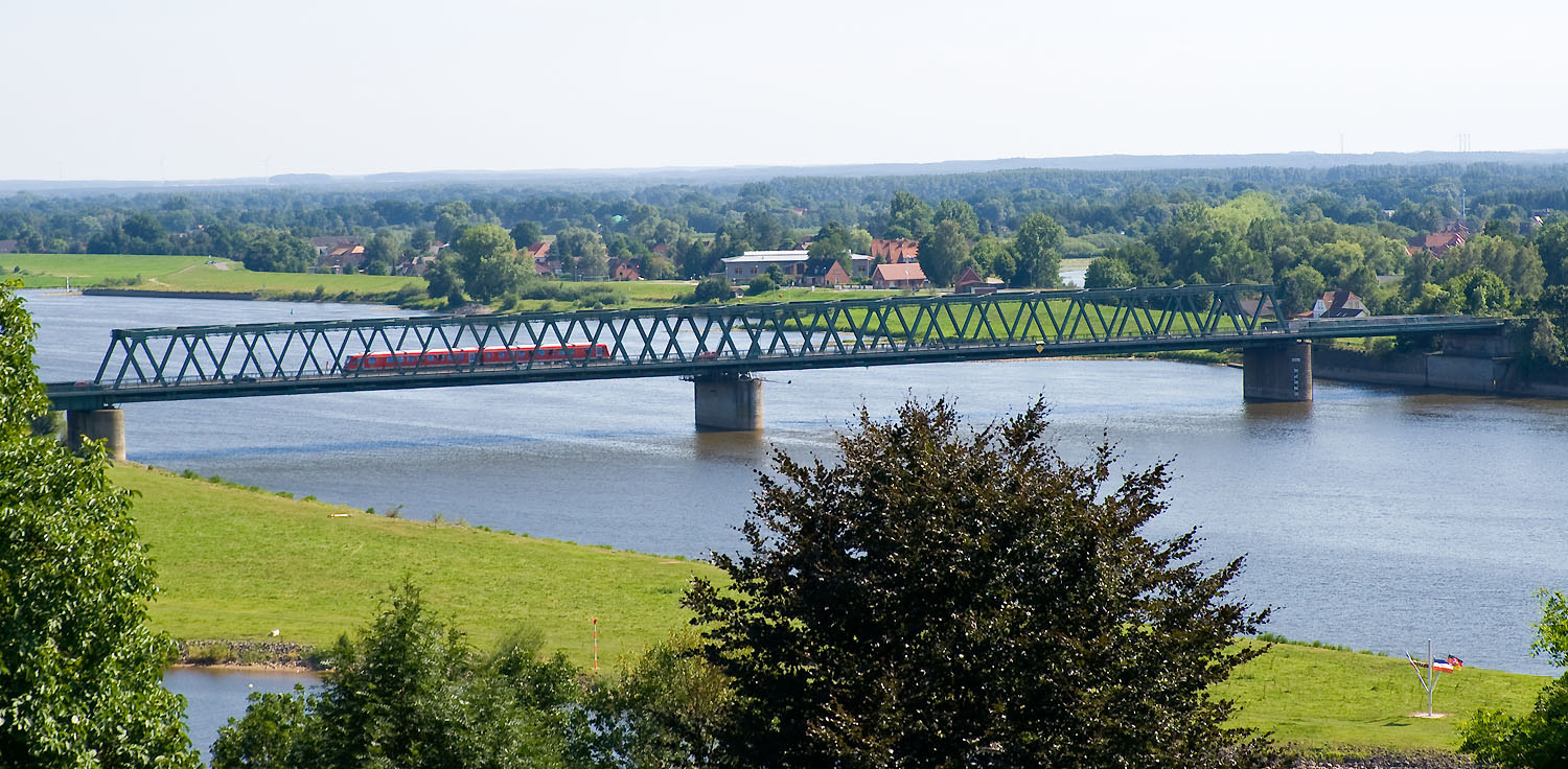 Elbbrücke Lauenburg. Auf der kombinierten Straßen- und Eisenbahnbrücke überquert eine Regionalbahn Lüneburg–Lübeck die Elbe.